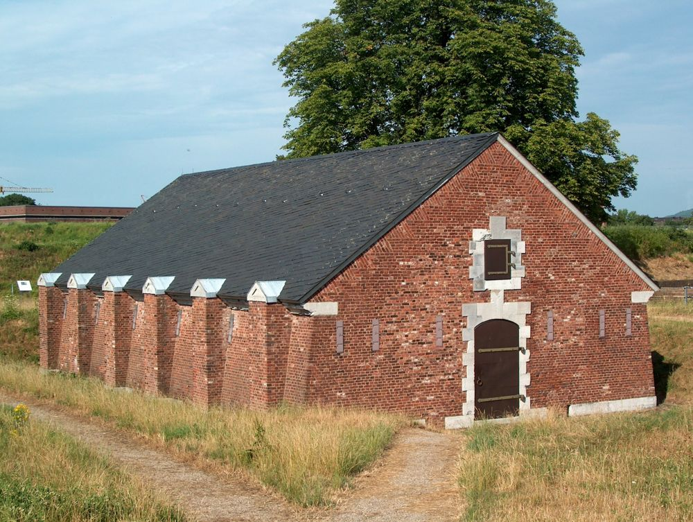 Pulvermagazin auf der Zitadellenbastion IV in Jülich